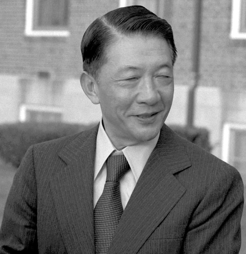 孔令晟參觀美國海軍教育與發展司令部